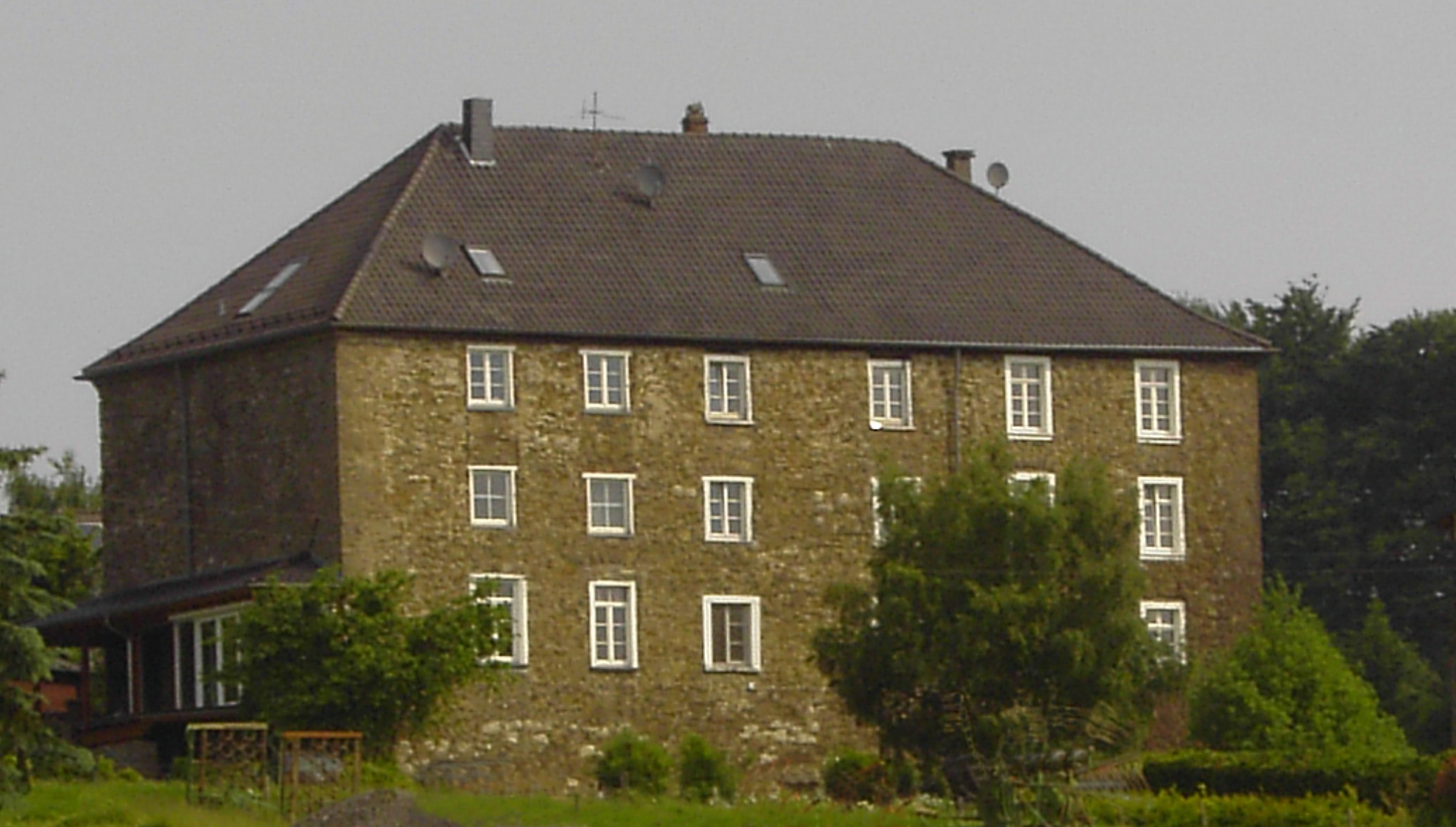 Digital StillCamera